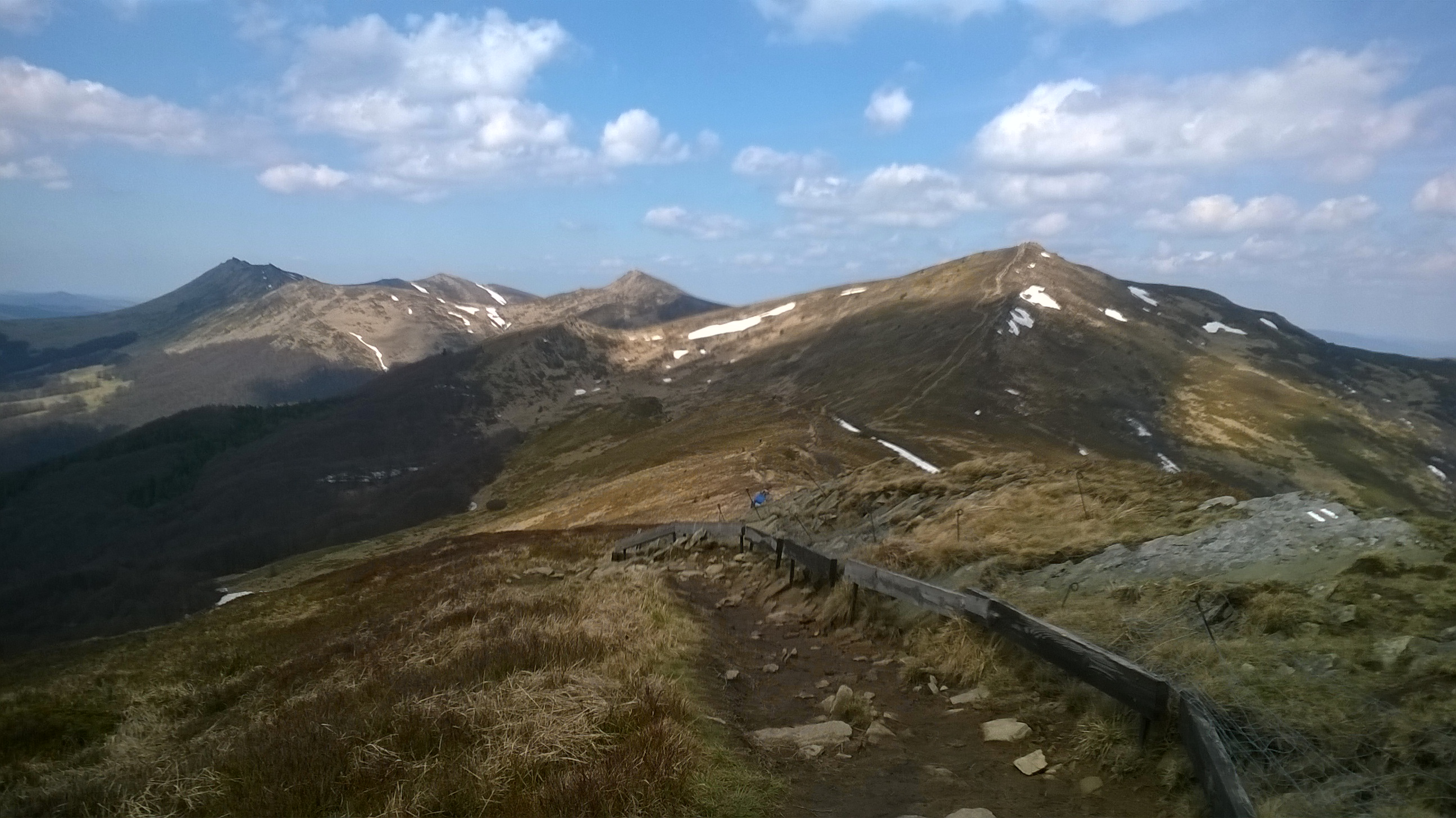 Specjalny obszar ochrony siedlisk Bieszczady. This is a photography of Natura 2000 protected area with ID PLC180001